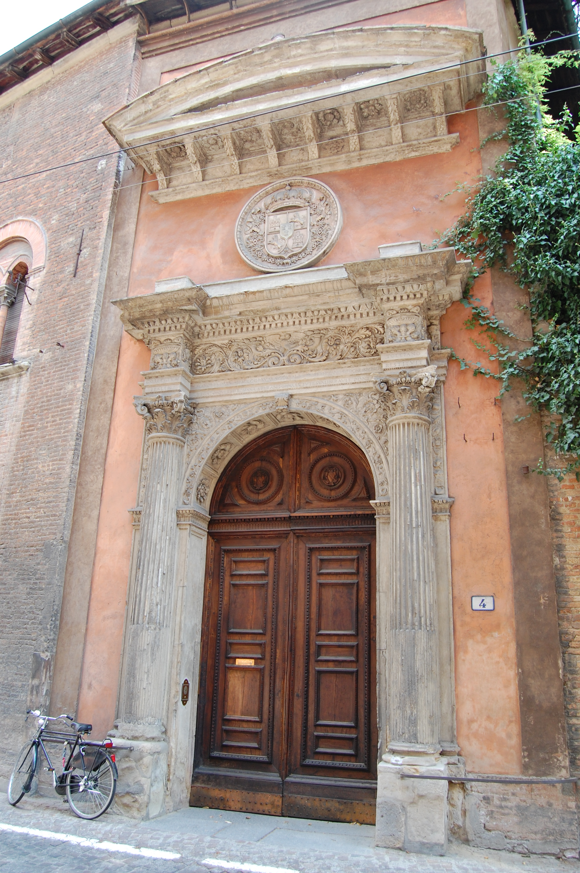 Puerta principal del Real Colegio de España en Bolonia (Italia), via Collegio di Spagna 4, 40123 Bologna.